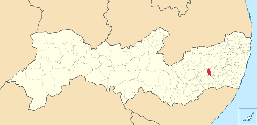 Mapa de Agrestina (2)